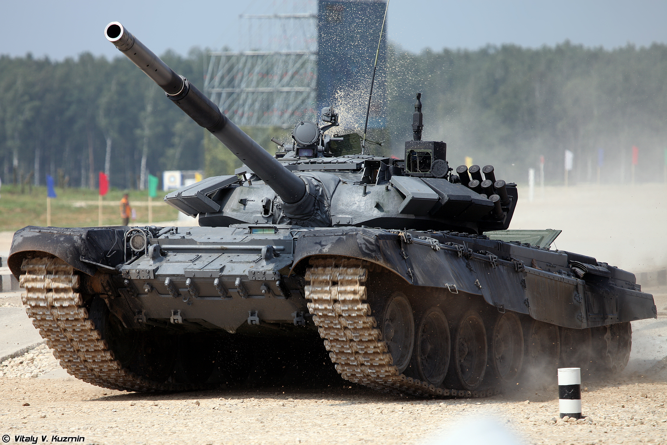 Т-72Б3 команды Индии (Team India T-72B3)